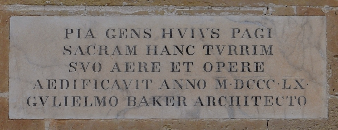 Gudja. Malti: Gudja.